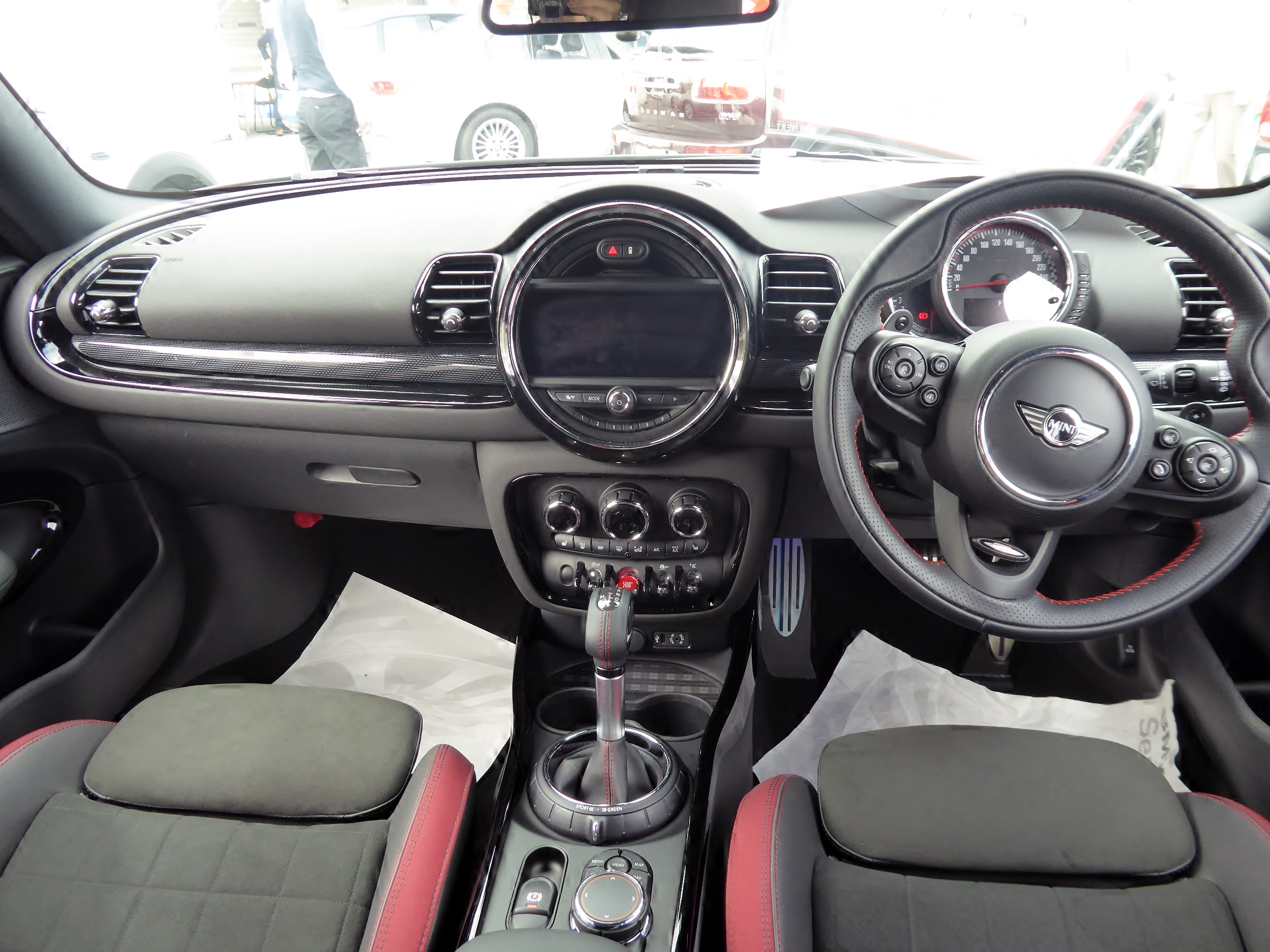 F54系BMW・ミニクラブマンジョンクーパーワークスのインテリアを撮影。